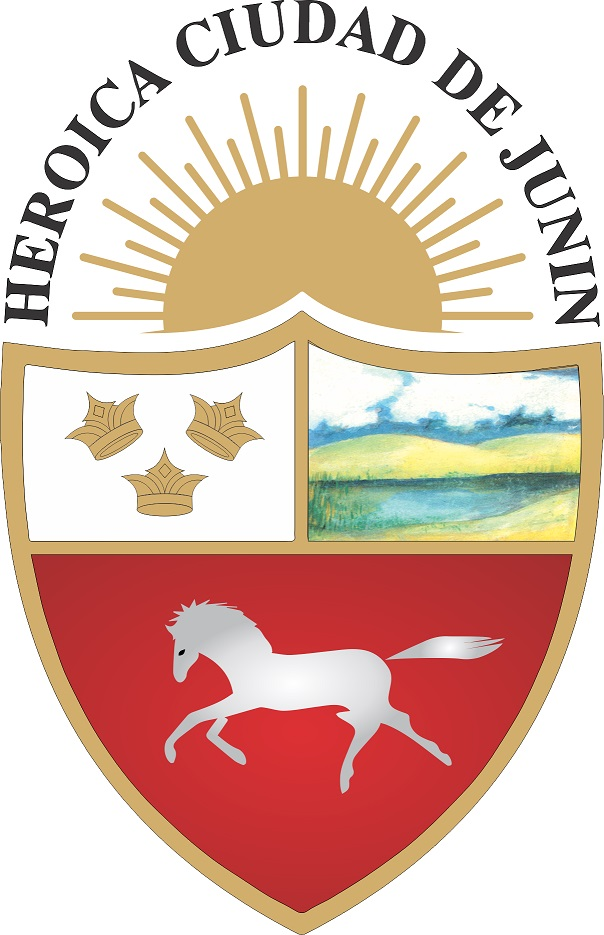 Escudo provincia Junin